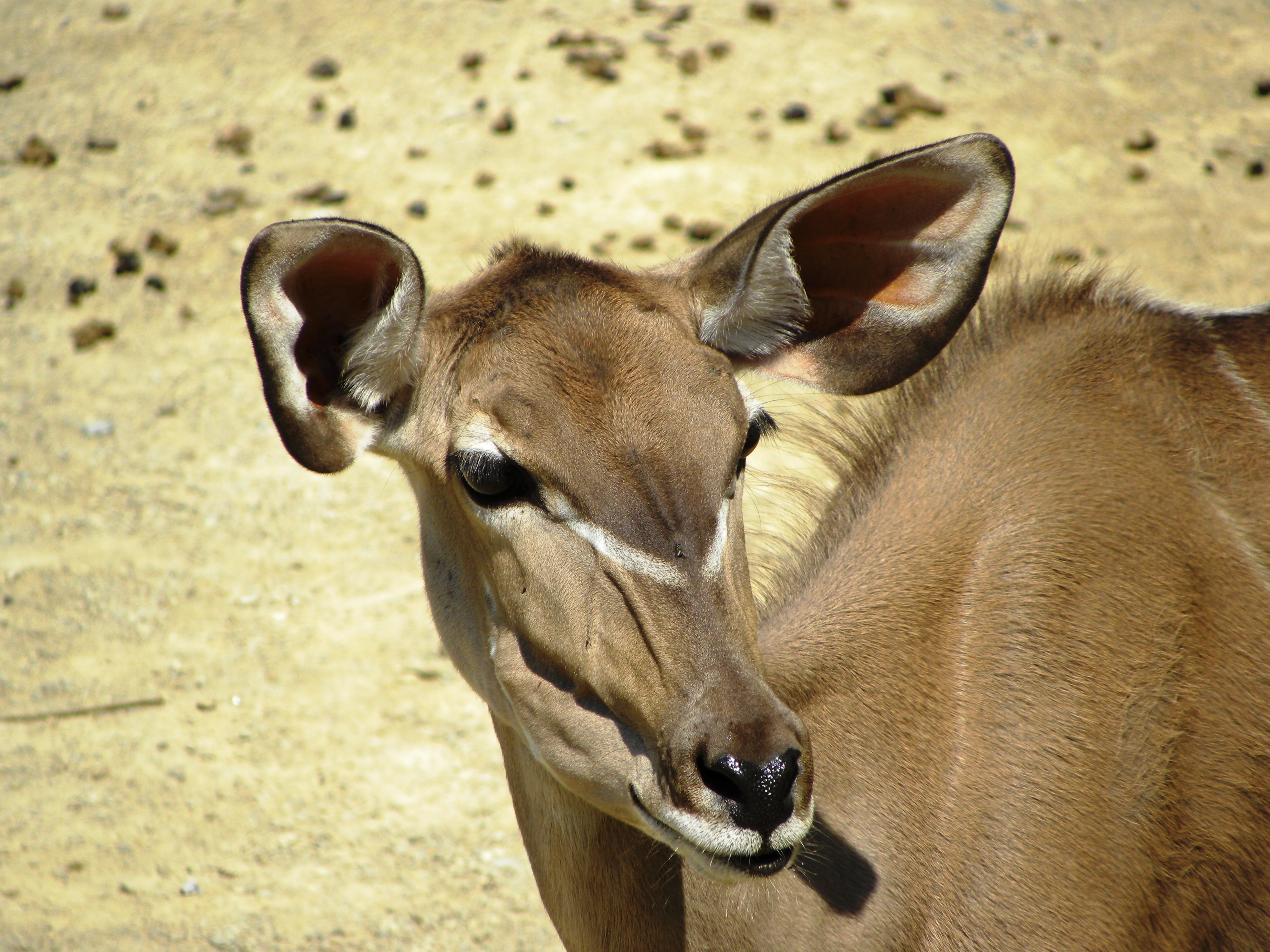 Grote koedoe